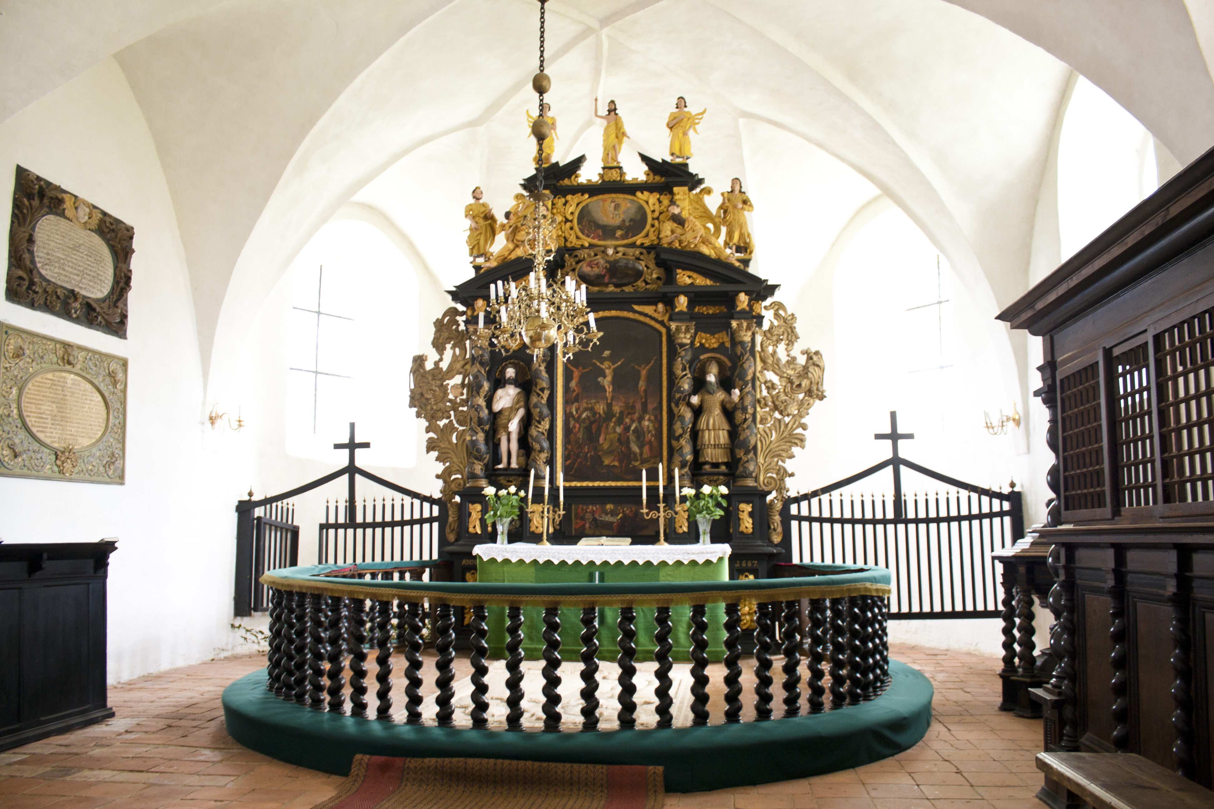 Nurmuižas luterāņu baznīca, Lauciene